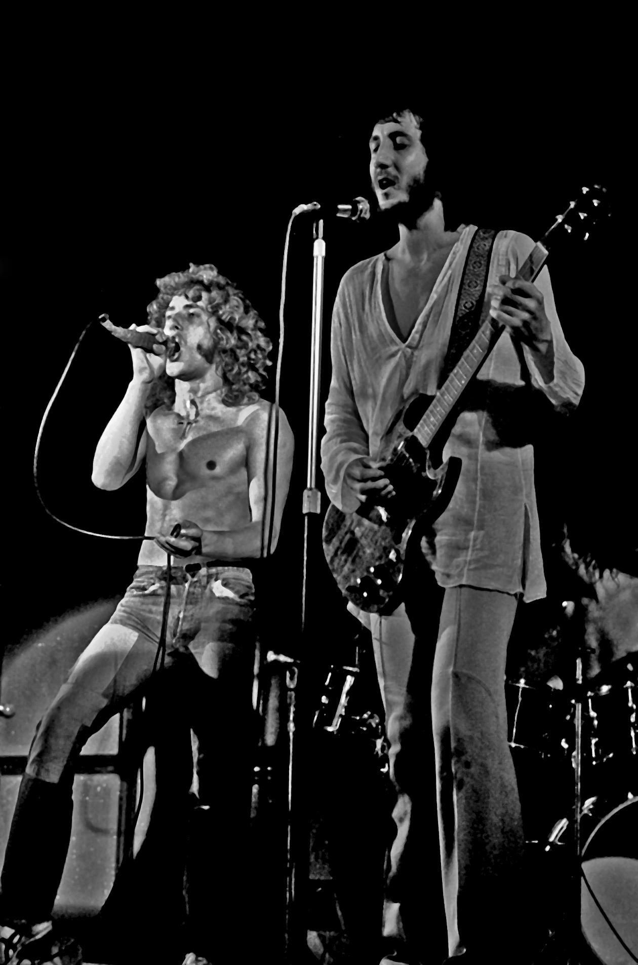 The Who, Ernst-Merck-Halle Hamburg, August 1972: Roger Daltrey, Pete Townshend in einem der ruhigeren Momente